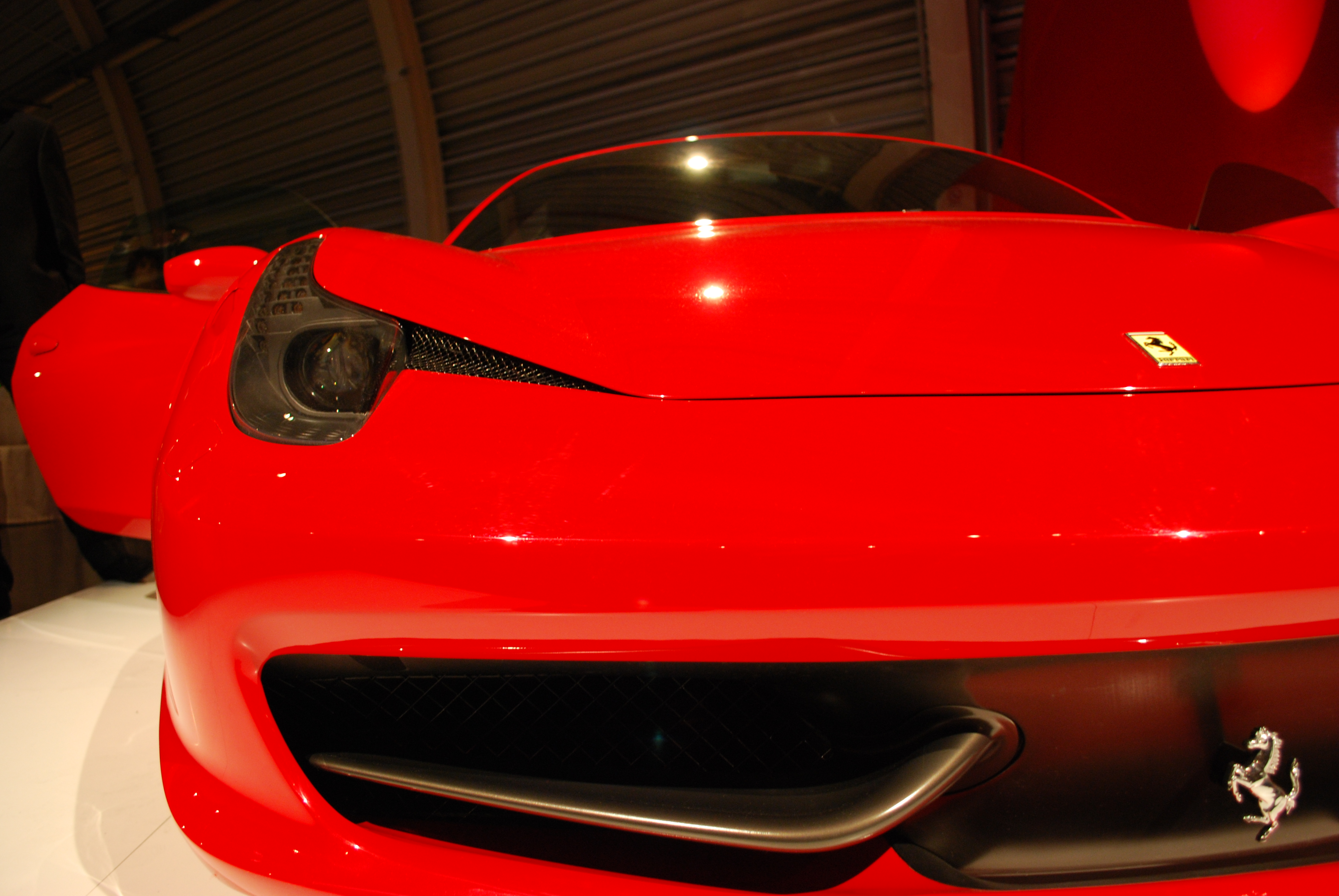 Calandre de la Ferrari 458 Italia